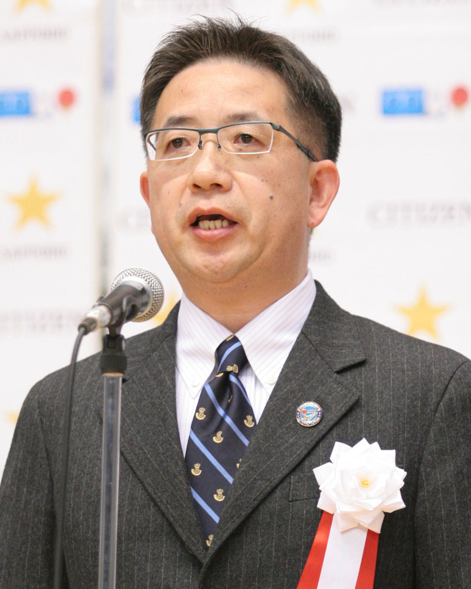 全日本卓球で開会宣言をする前原正浩氏